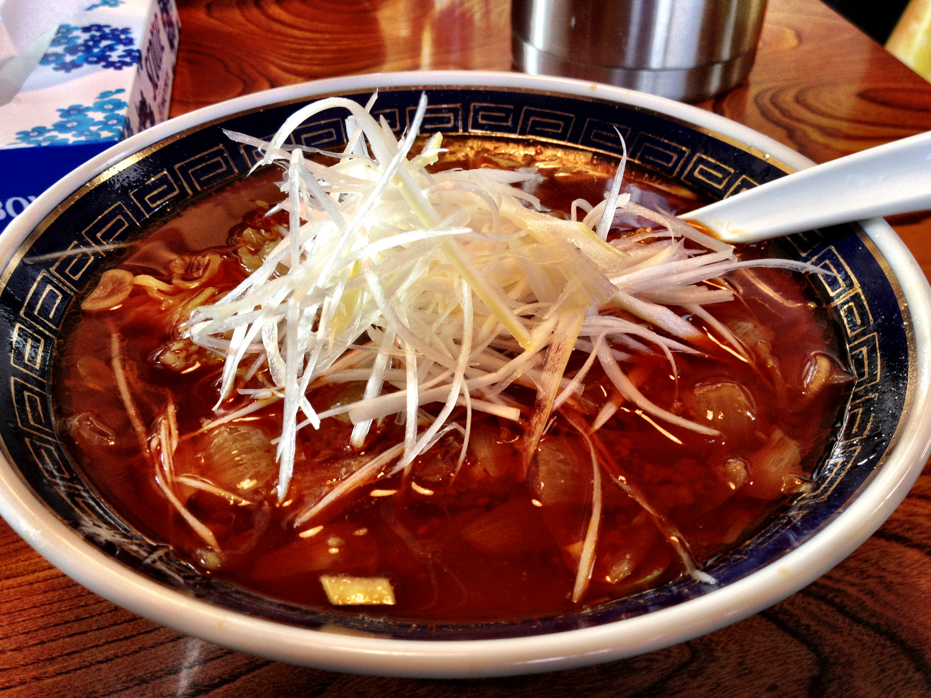 BMW に慣れるためのドライブで、前から気になっていた勝浦タンタンメンを食べに鴨川までやってきた。 高速降りて30分ほど走っていると、急にたくさんクルマが止まっていて、店はすぐわかる。 満席だったので15分ほど待って店内へ。タンタン麺は注文後15分ほどでテーブルへやってきた。 貝柱のスープとラー油、ひき肉と玉ねぎの炒めた甘みのバランスがとてもよい。見た目以上に辛さは感じないが、食べ進むにつれて、汗がぽたぽたと出てくる。 勝浦タンタン麺、うまかったのでまた別の店にもいってみよう。